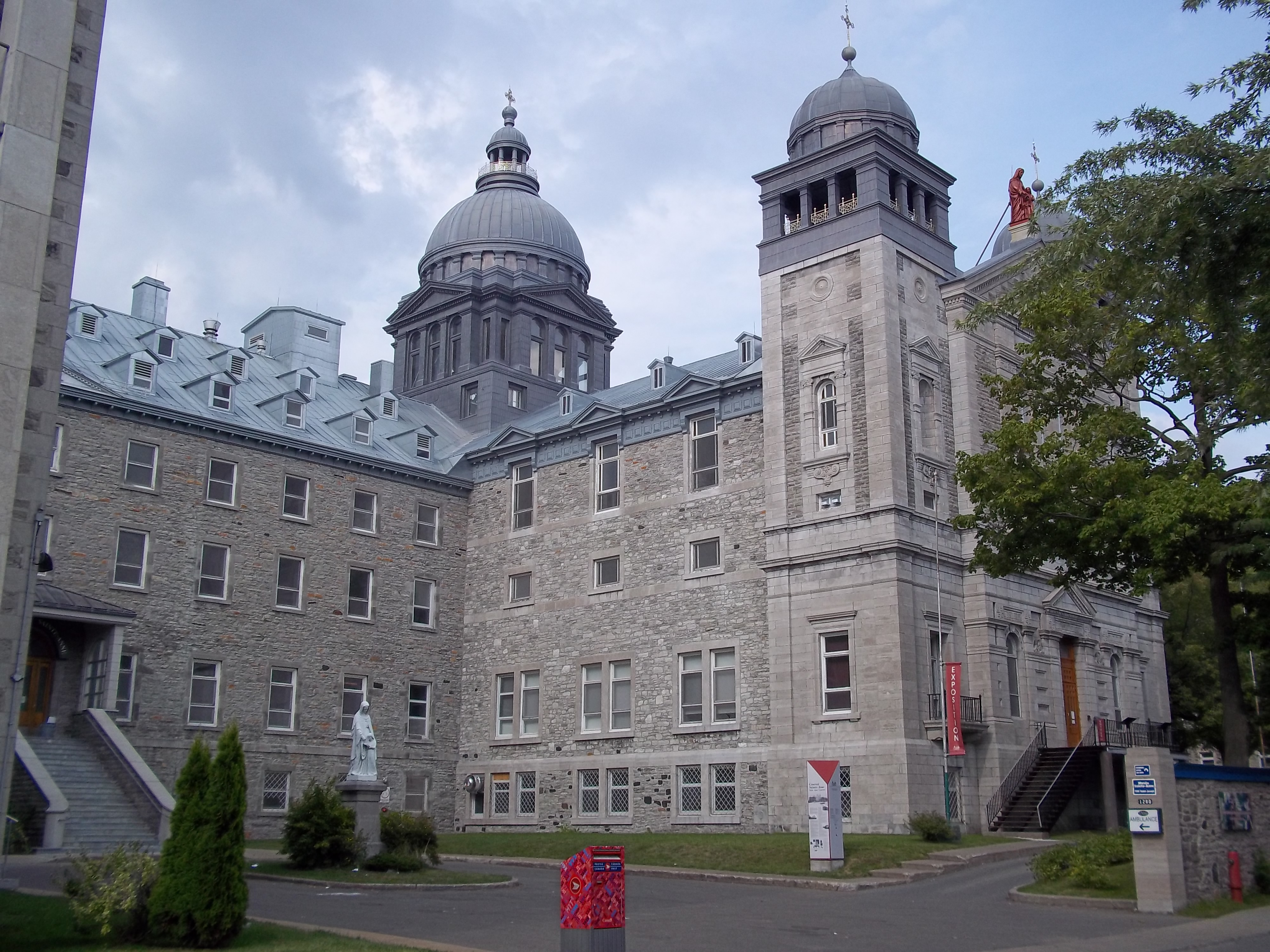 Couvent Sainte-Anne, rue Saint-Joseph, Lachine, Montréal info